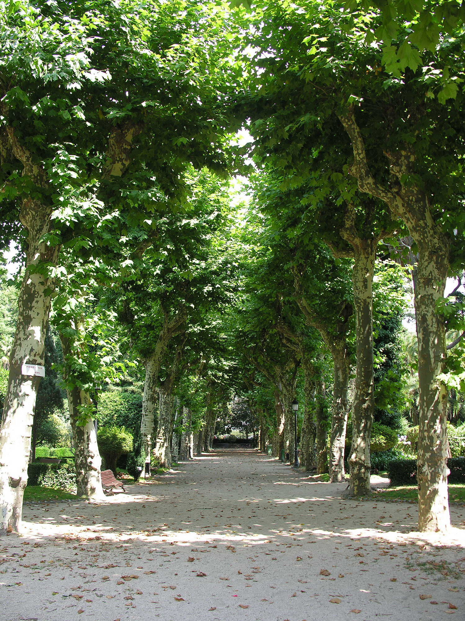 Xardín botánico de Padrón, Galicia Publish by= Luis Miguel Bugallo Sánchez.